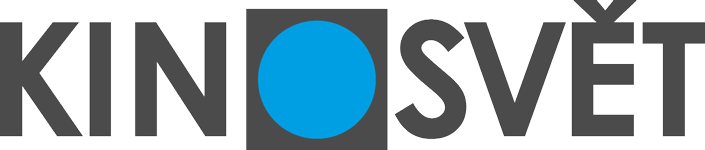 logo